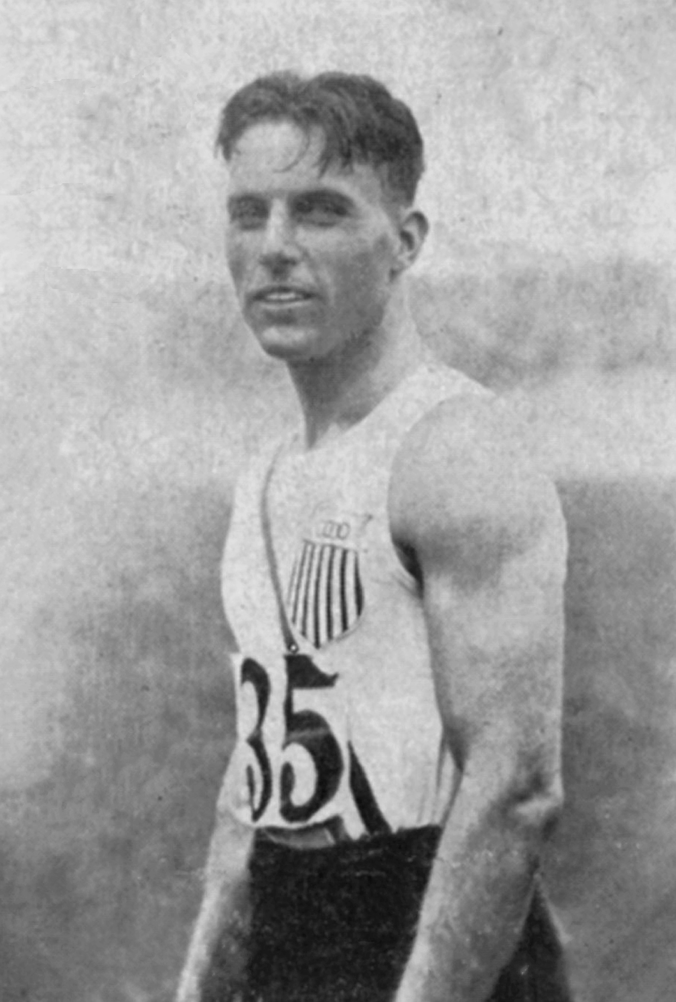 Bud Houser